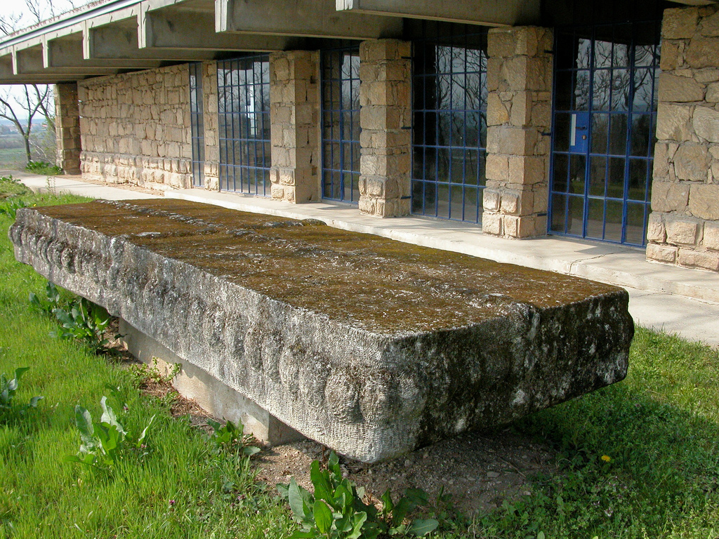 Tisch (1969) by Karl Prantl (der "Tisch" ist nicht mehr in St. Margarethen sondern in Pöttsching aufgestellt) - Symposion Europäischer Bildhauer, St.Margarethen, Burgenland, Austria mehr info auf